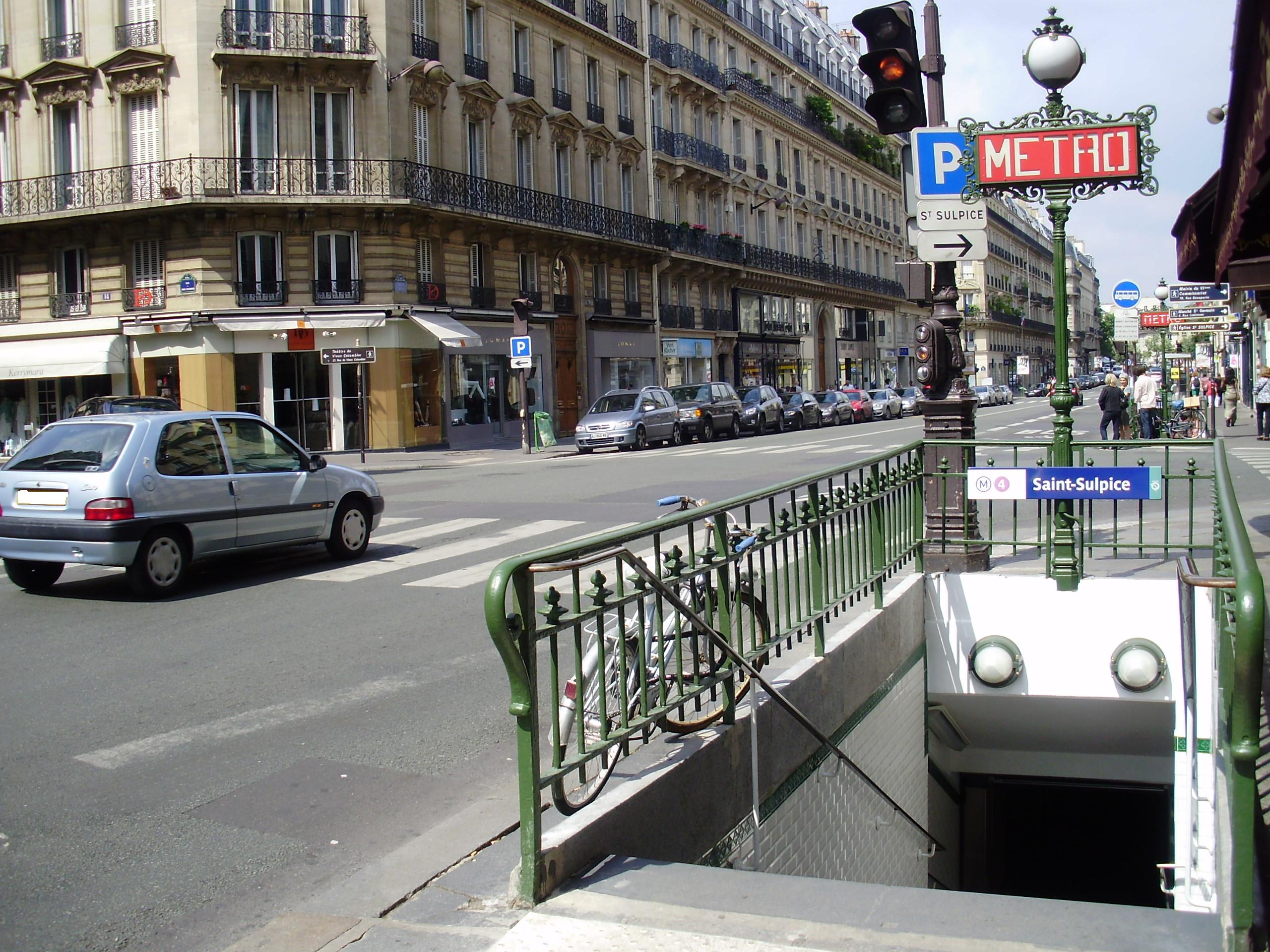 Entrée de la station Saint-Sulpice du métro de Paris